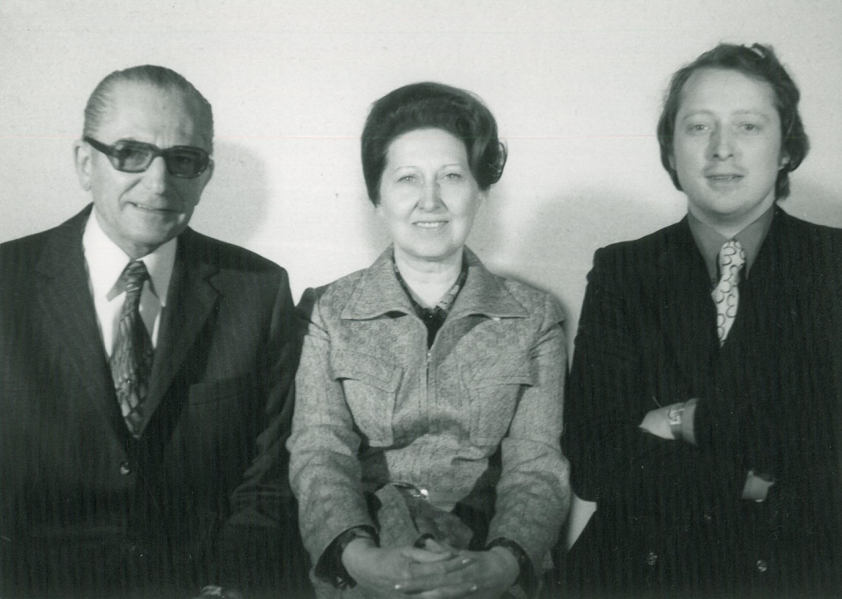 Familie Plapperer